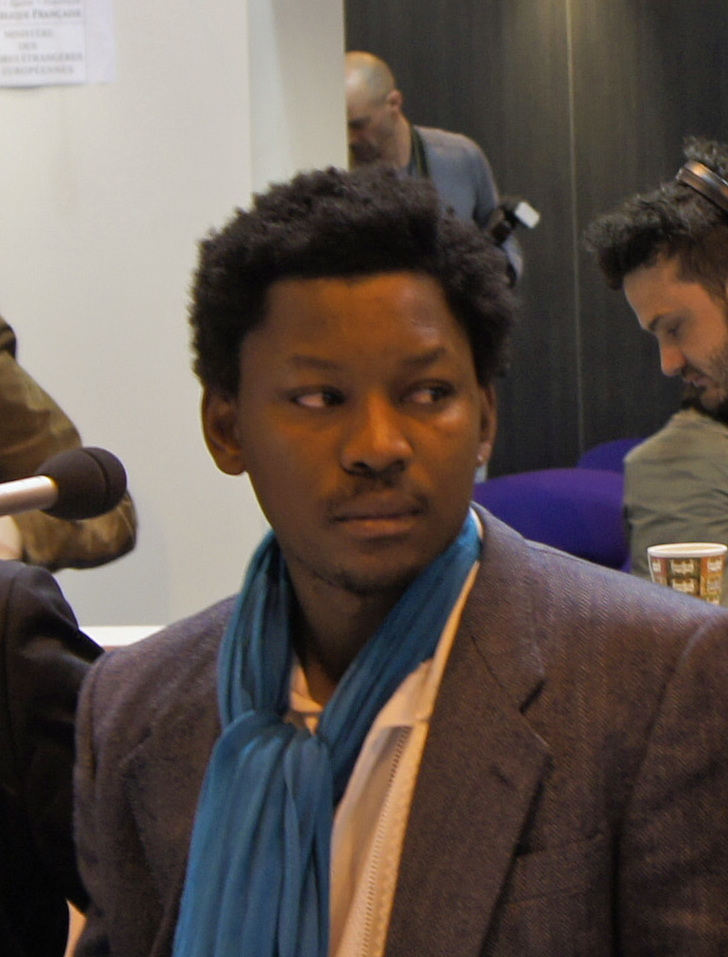 Débat de l'association AILF (association internationale des libraires francophones) pour ses 10 ans au Salon du Livre 2012, à gauche manquent Jutta Hepke et Rodney Saint-Eloi.